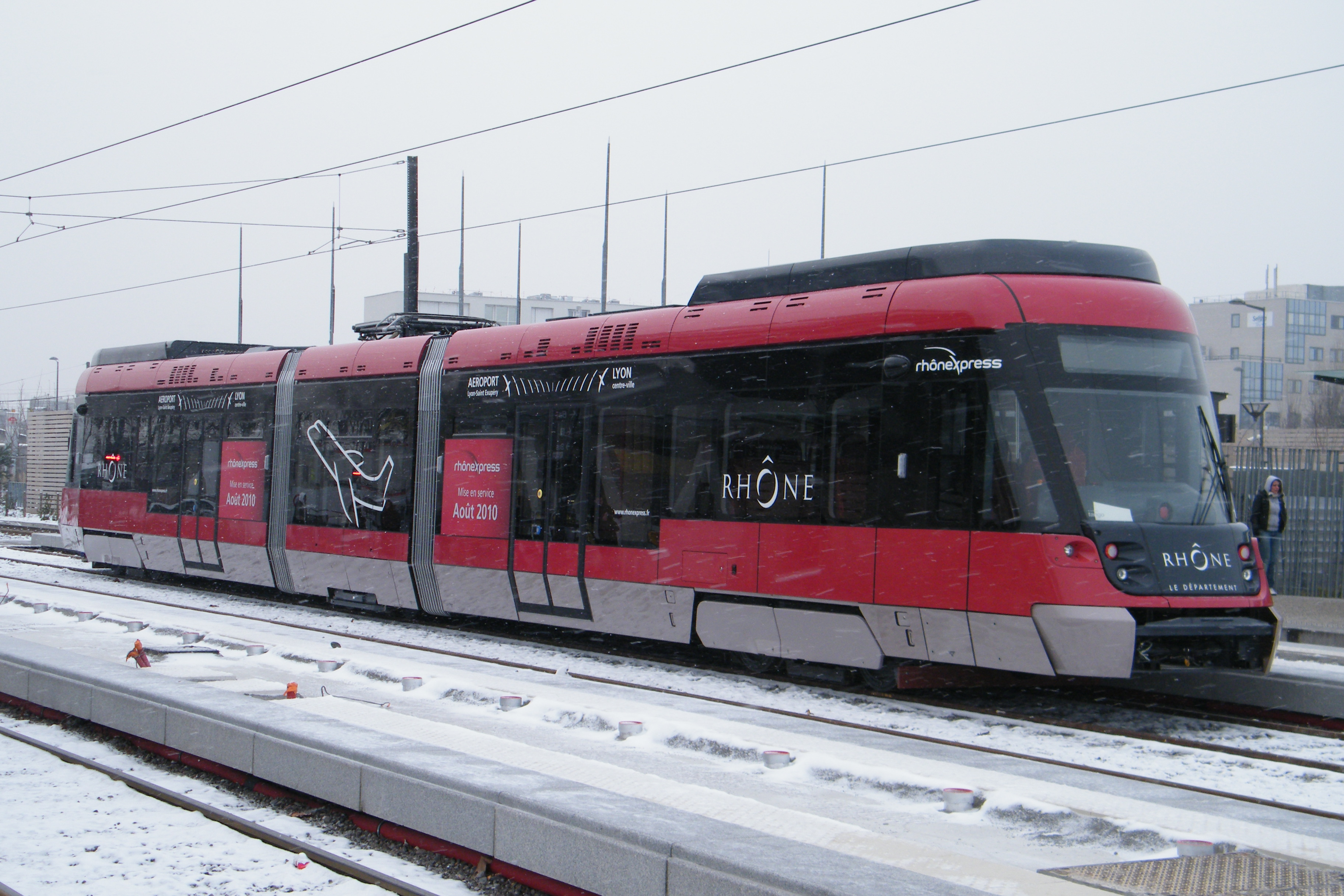 Une rame de la ligne Rhônexpress stationne toute la journée du Jeudi 11 Février 2010 à la station Vaulx La Soie.